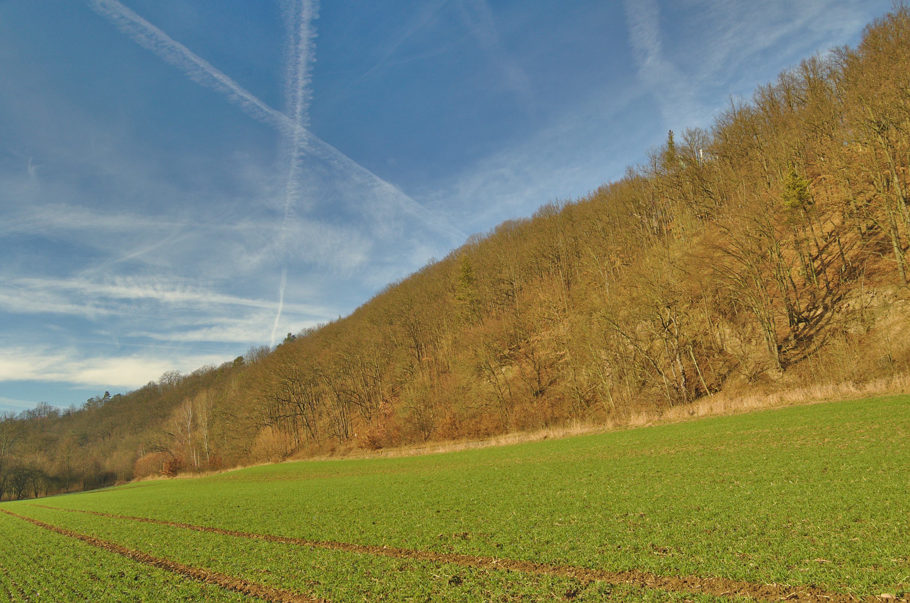 Přírodní památka Lebeďák, okres Blansko